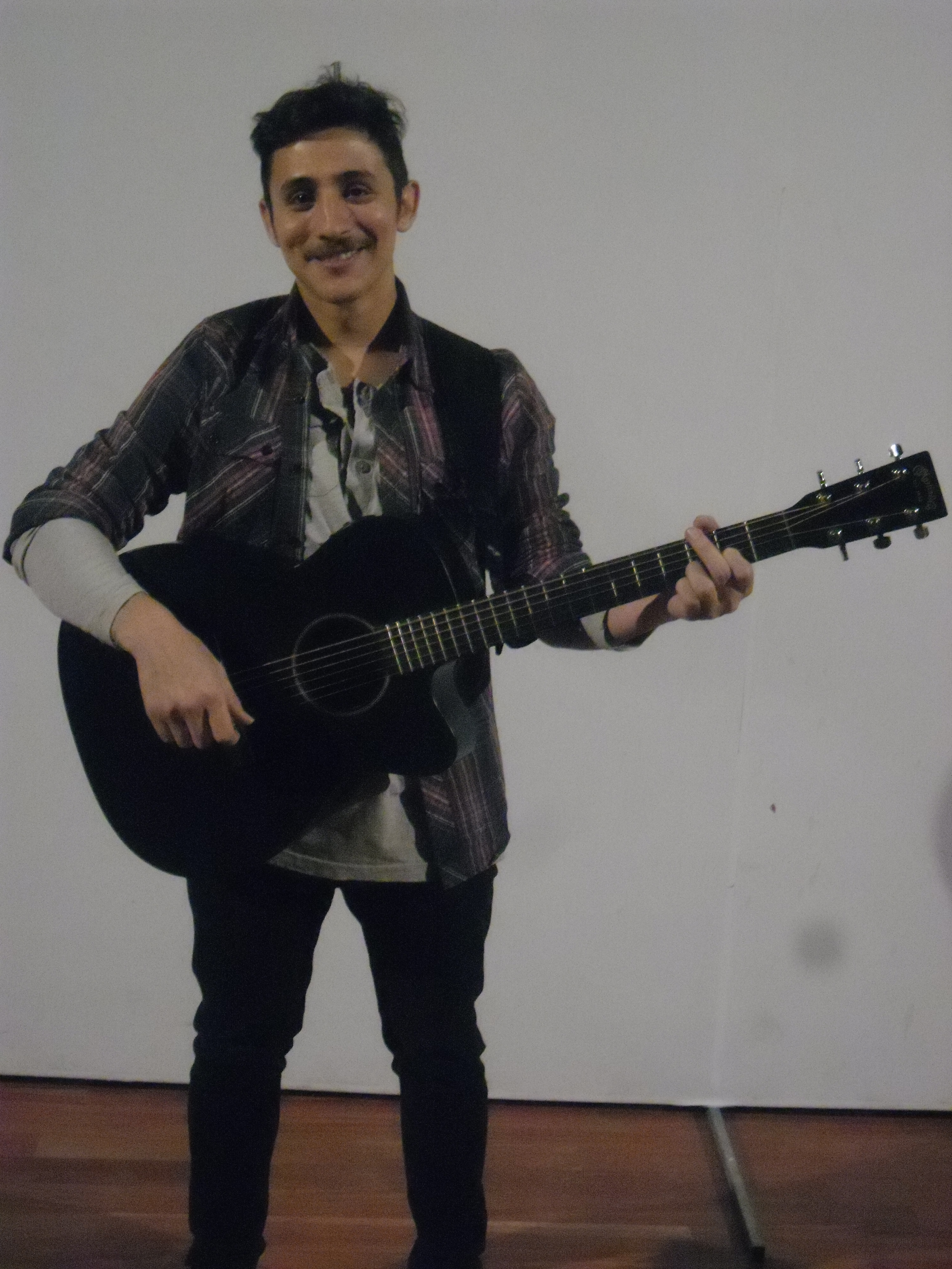 El cantautor argentino Sebastián Garay en el año 2015.